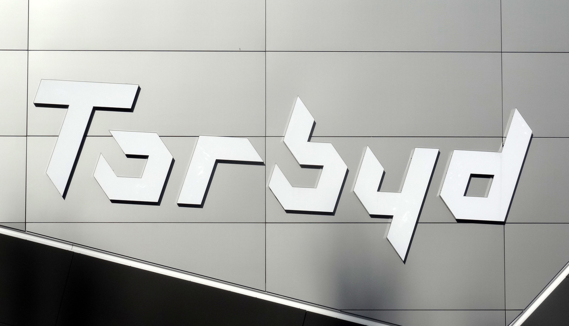 Sztuczne lodowisko "Torbyd" w Bydgoszczy, ul. Toruńska 59